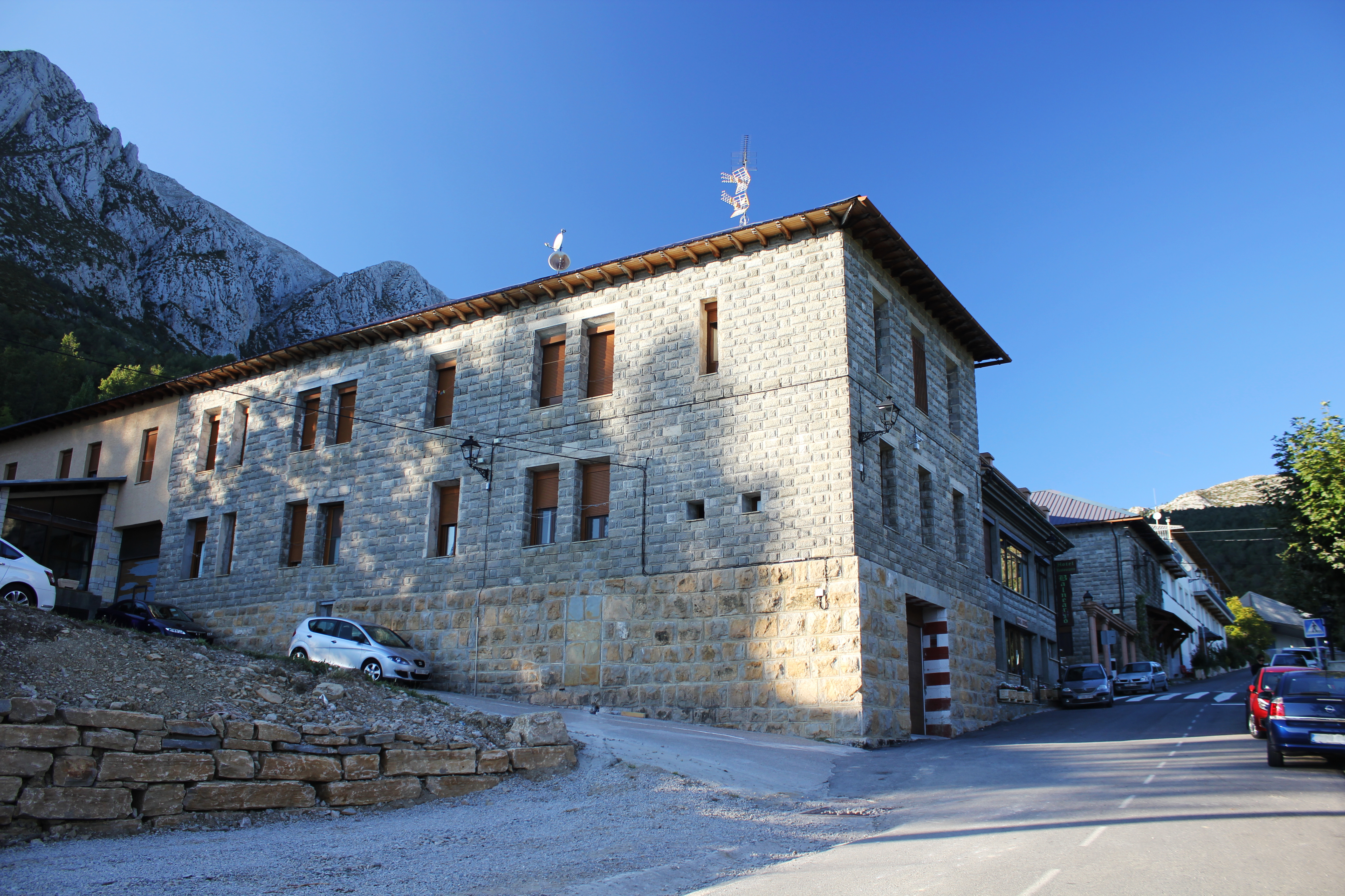 Balneario de Las Vilas, en Las Vilas del Turbón, municipio de Torlarribera, Ribagorza, Huesca. Aragonés: Balneyario de las Vilas, en las Vilas, municipio de Torlarribera, Ribagorza.